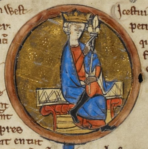 Miniature d'Egbert de Wessex dans une généalogie royale du XIIIe siècle.